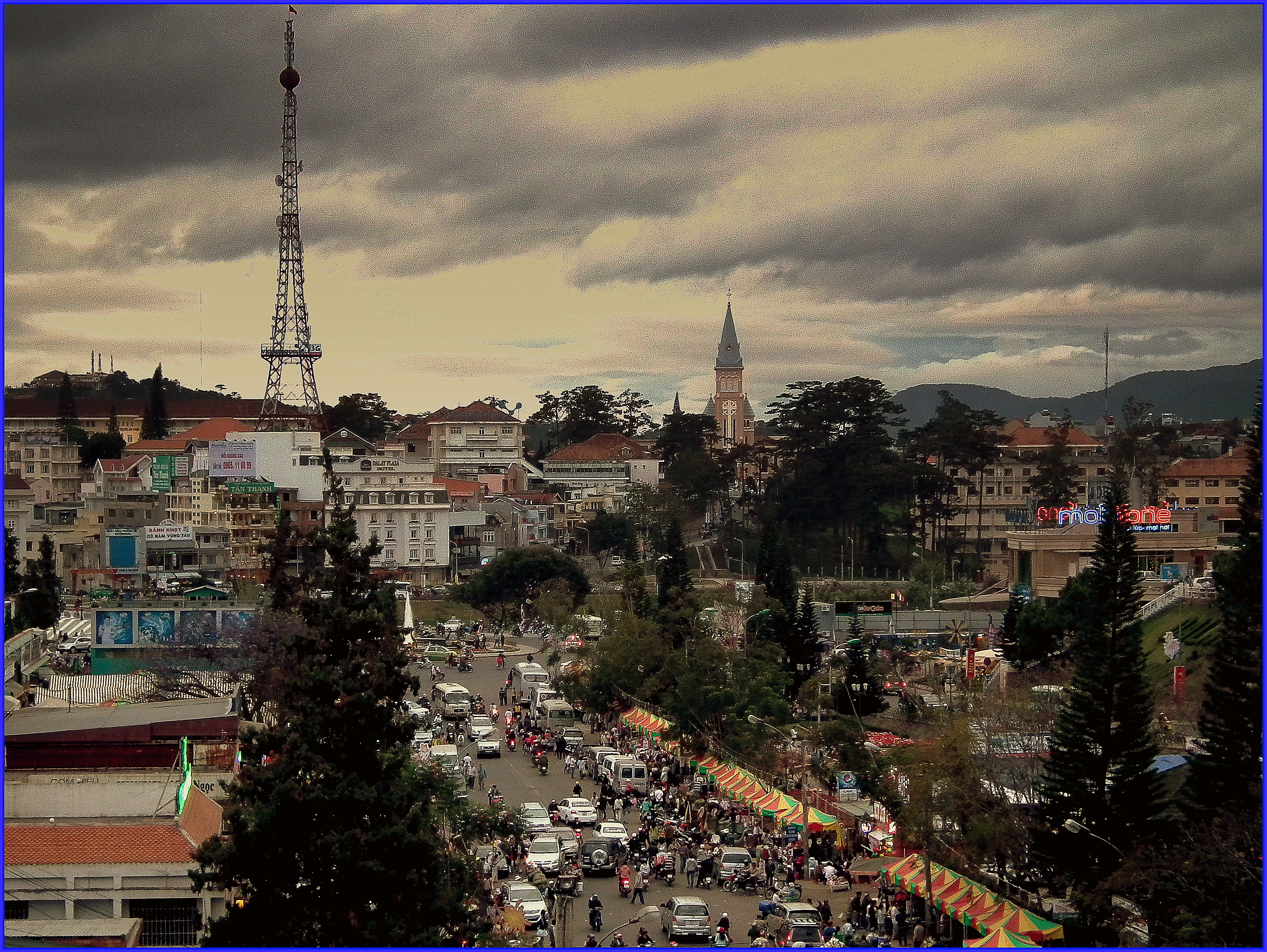 DA LAT MARKET VIETNAM JAN 2012